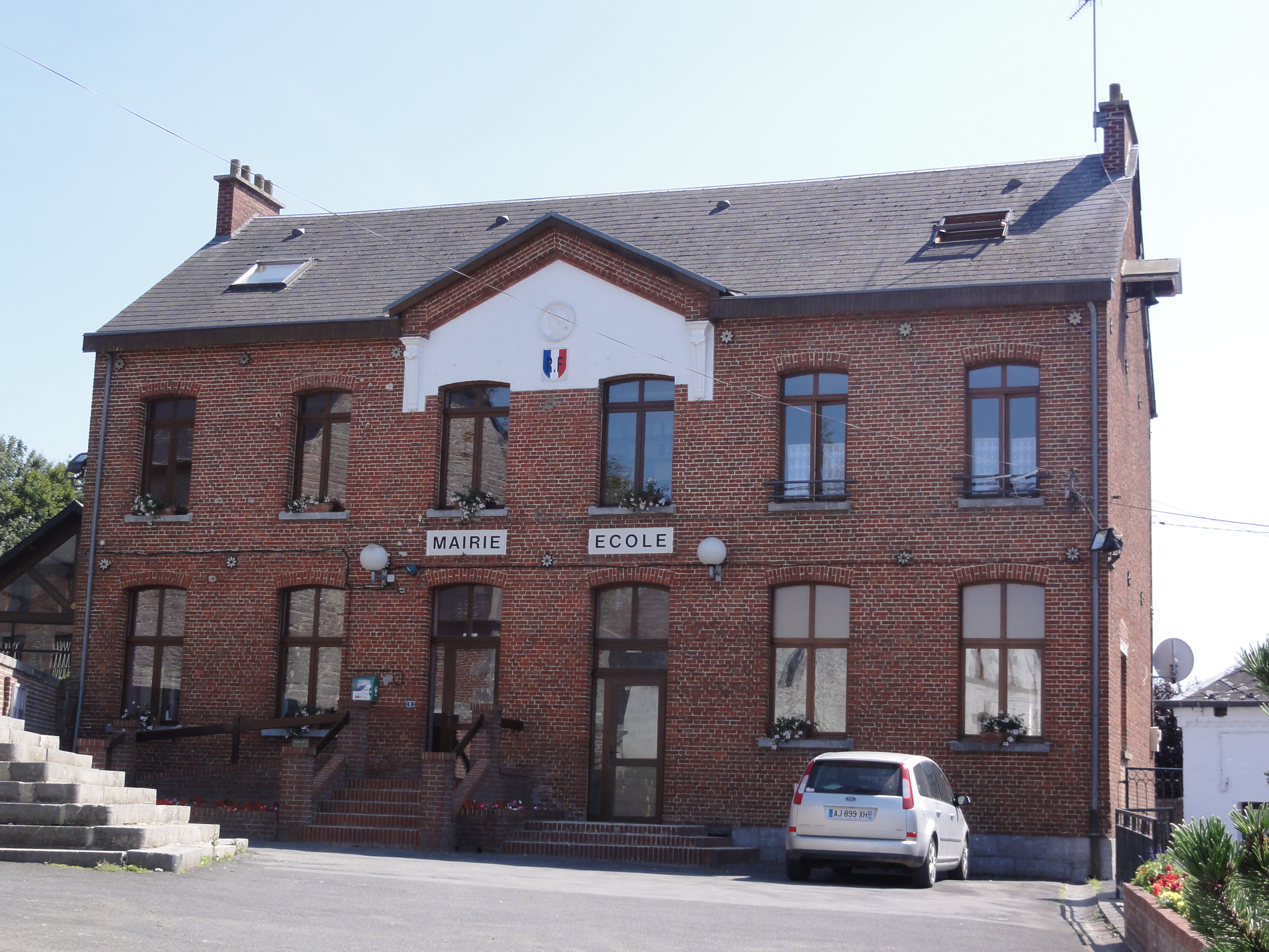 Dimont (Nord, Fr) mairie-école